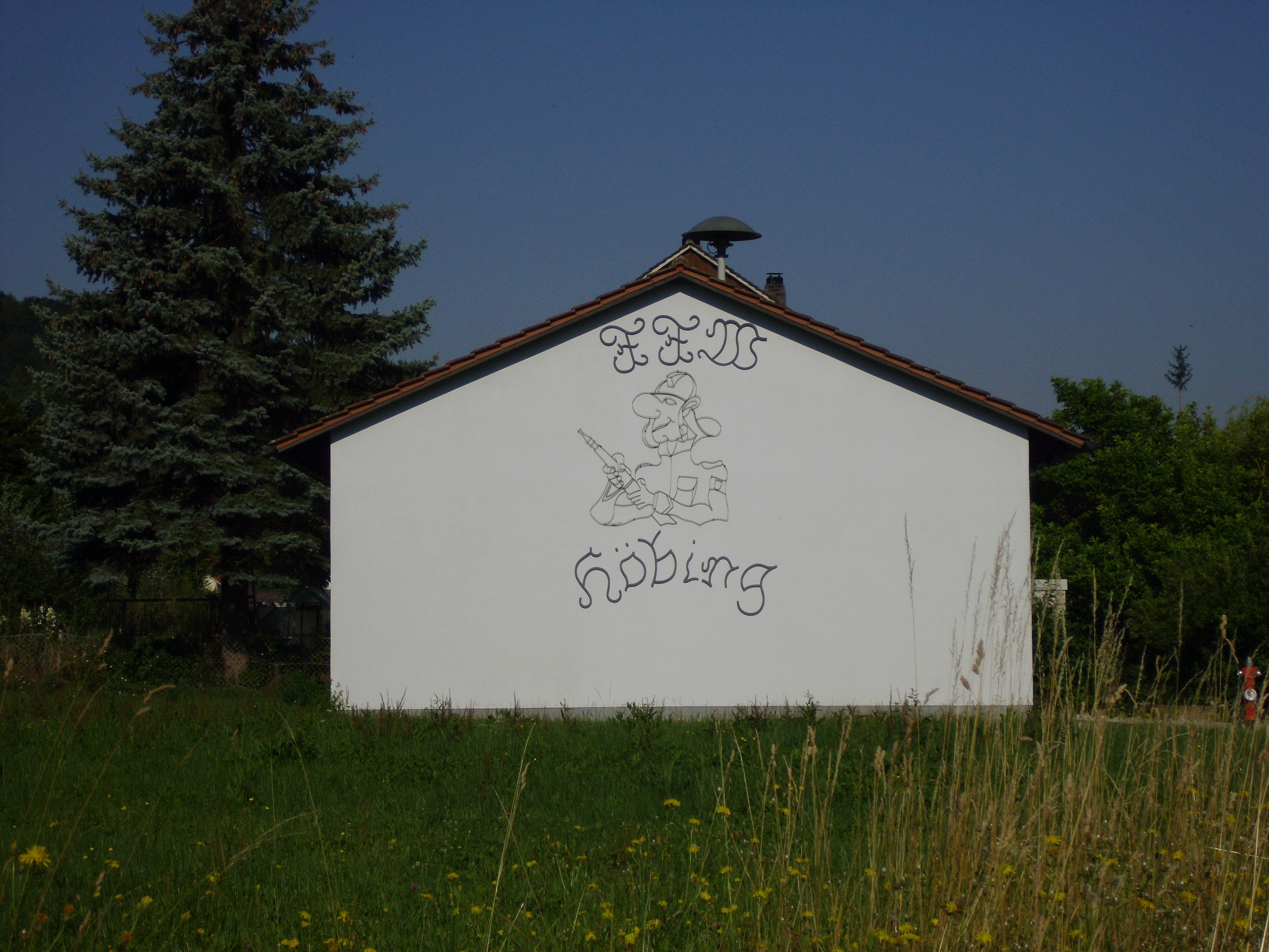 Großhöbing, Ortsteil der Stadt Greding im mittelfränkischen Landkreis Roth in Bayern, Feuerwehrhaus